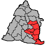 彰化第四選舉區